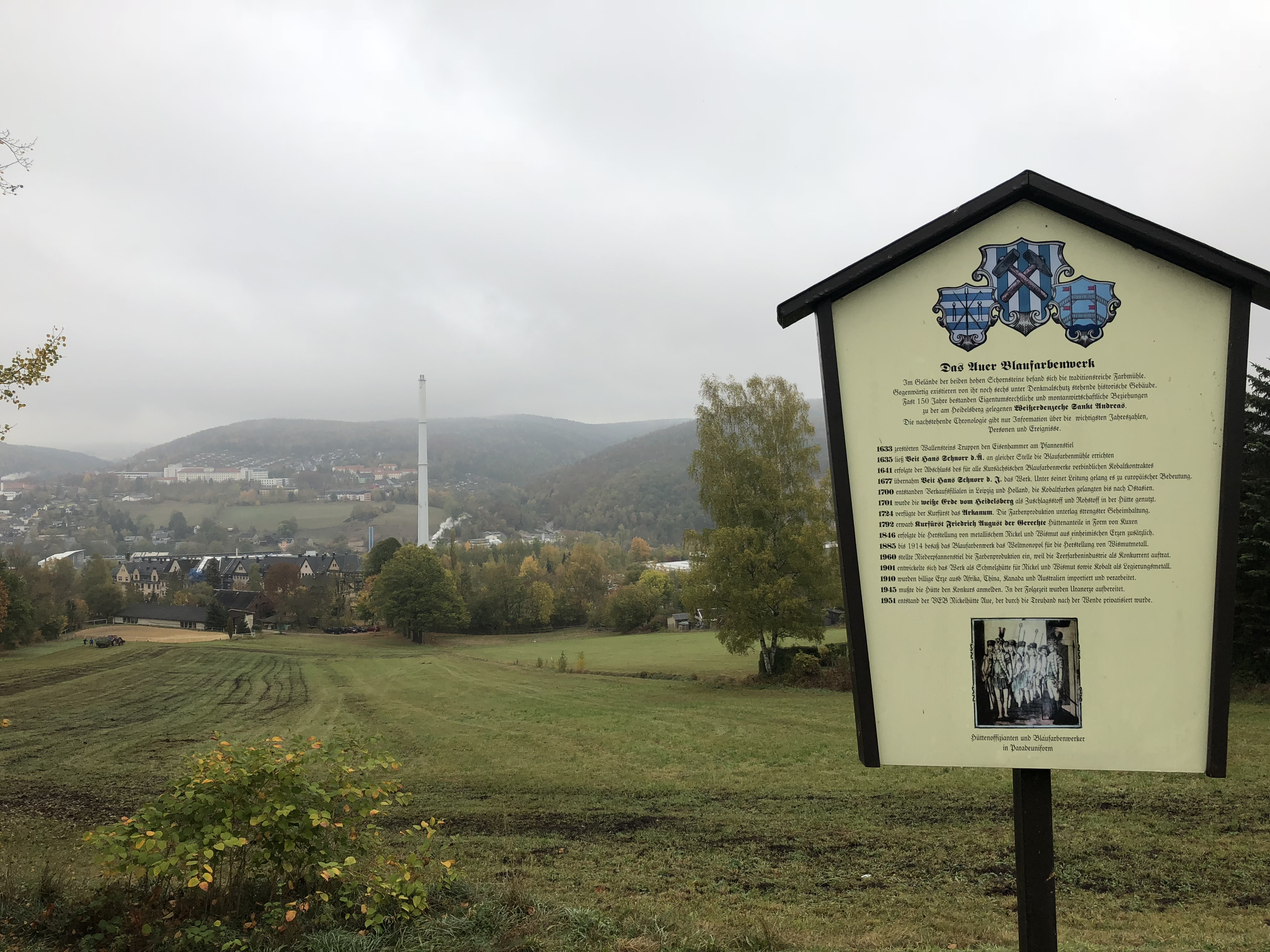 Aussichtspunkt Nickelhütte